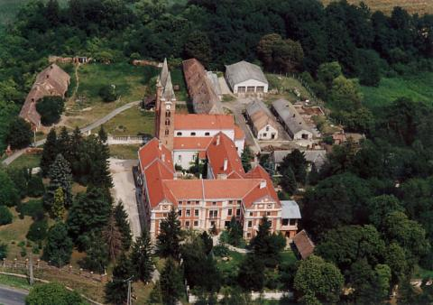 Türje, Hungary, aerialphotgraphy. Gyümölcsoltó Boldogasszony római katolikus templom